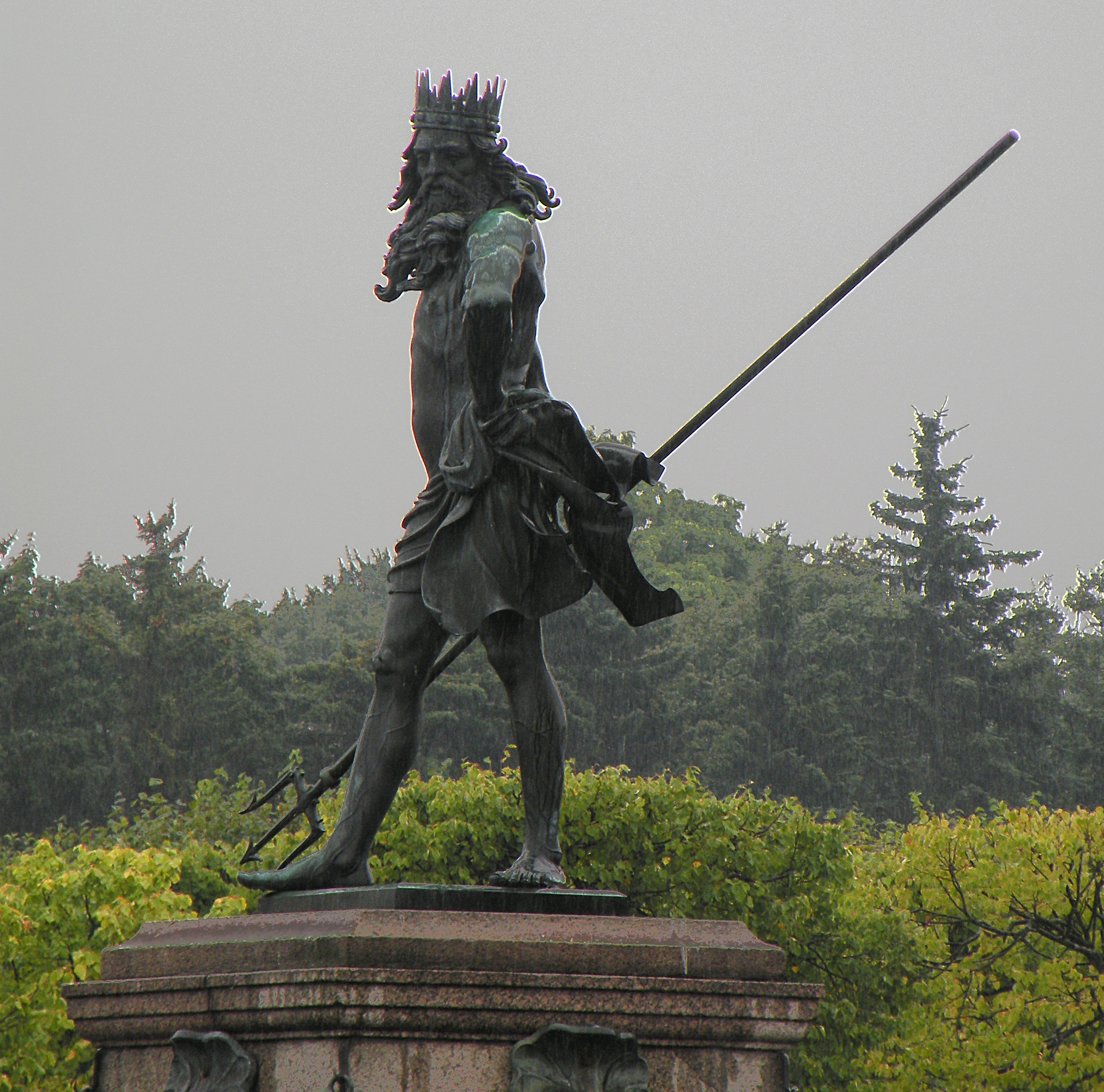 Нептун петергофский